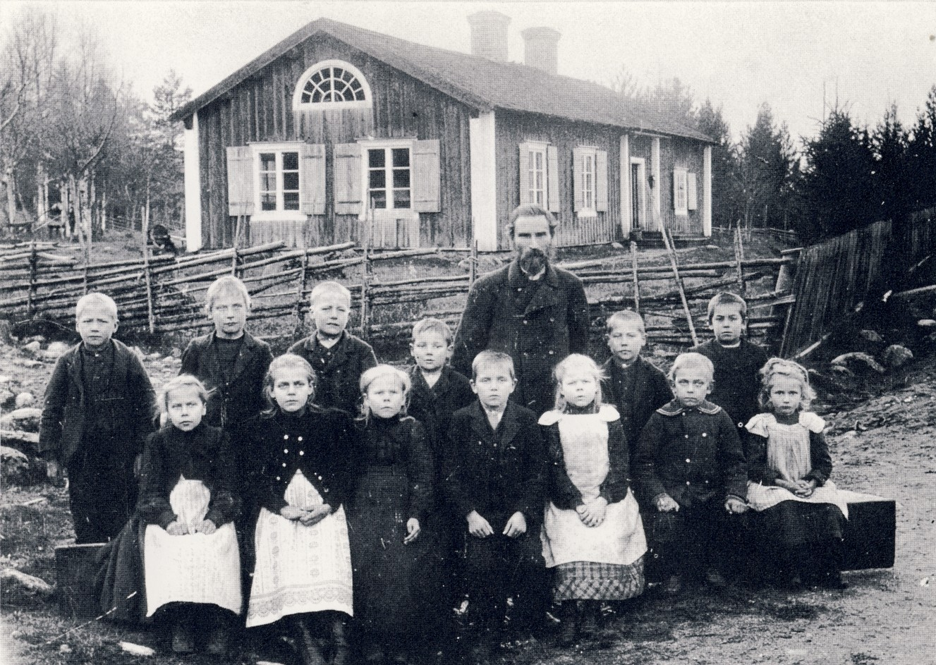 Adolf Andersson (Dan Anderssons far) med sin klass framför skolan i Skattlösberg, där Dan Andersson föddes 1888. Längs till höger i främre raden sitter Dan Anderssons syster Anna, fem år gammal.